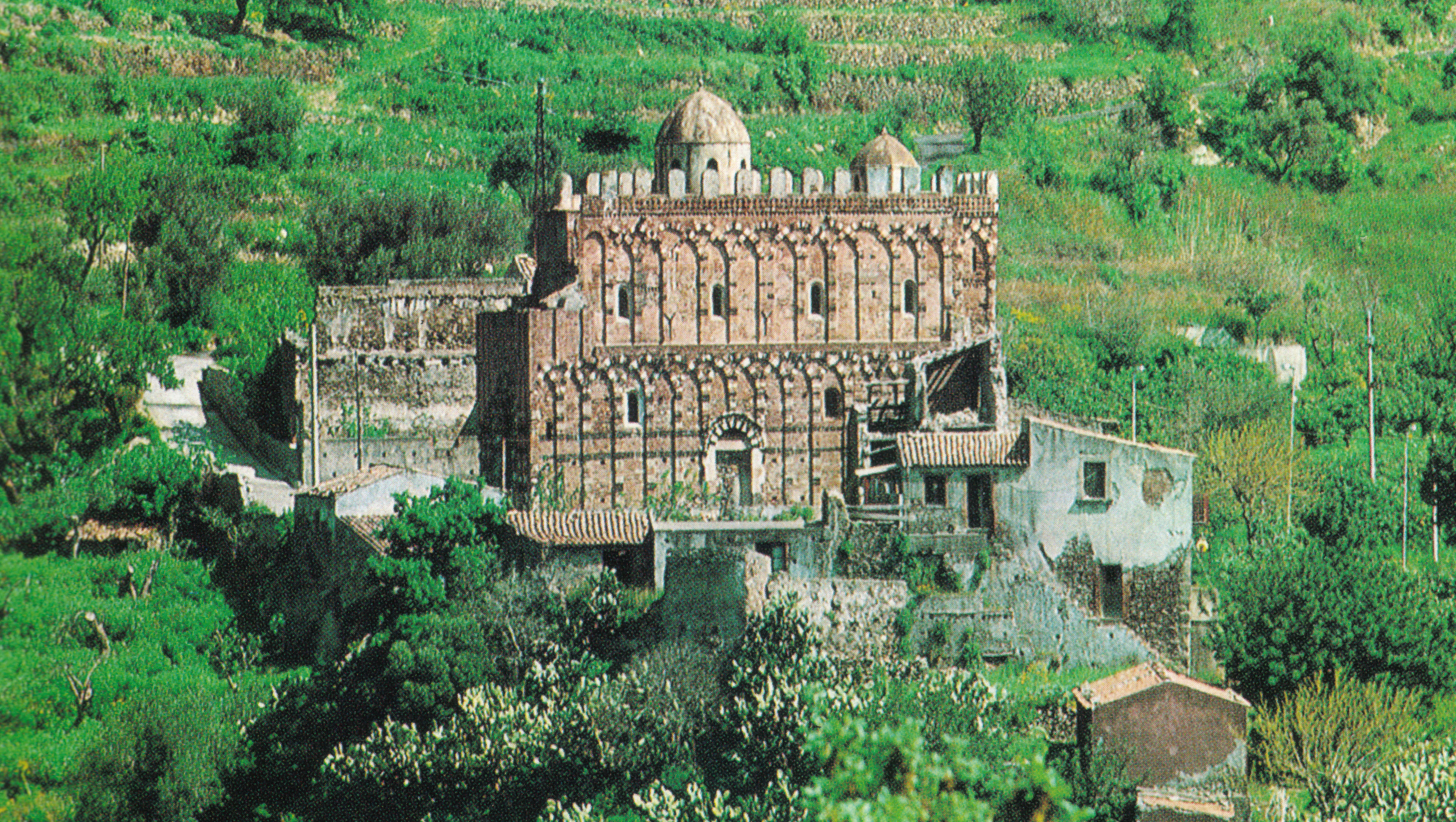 Chiesa_dei_SS. Pietro_e_Paolo__D'Agrò a Casalvecchio Siculo